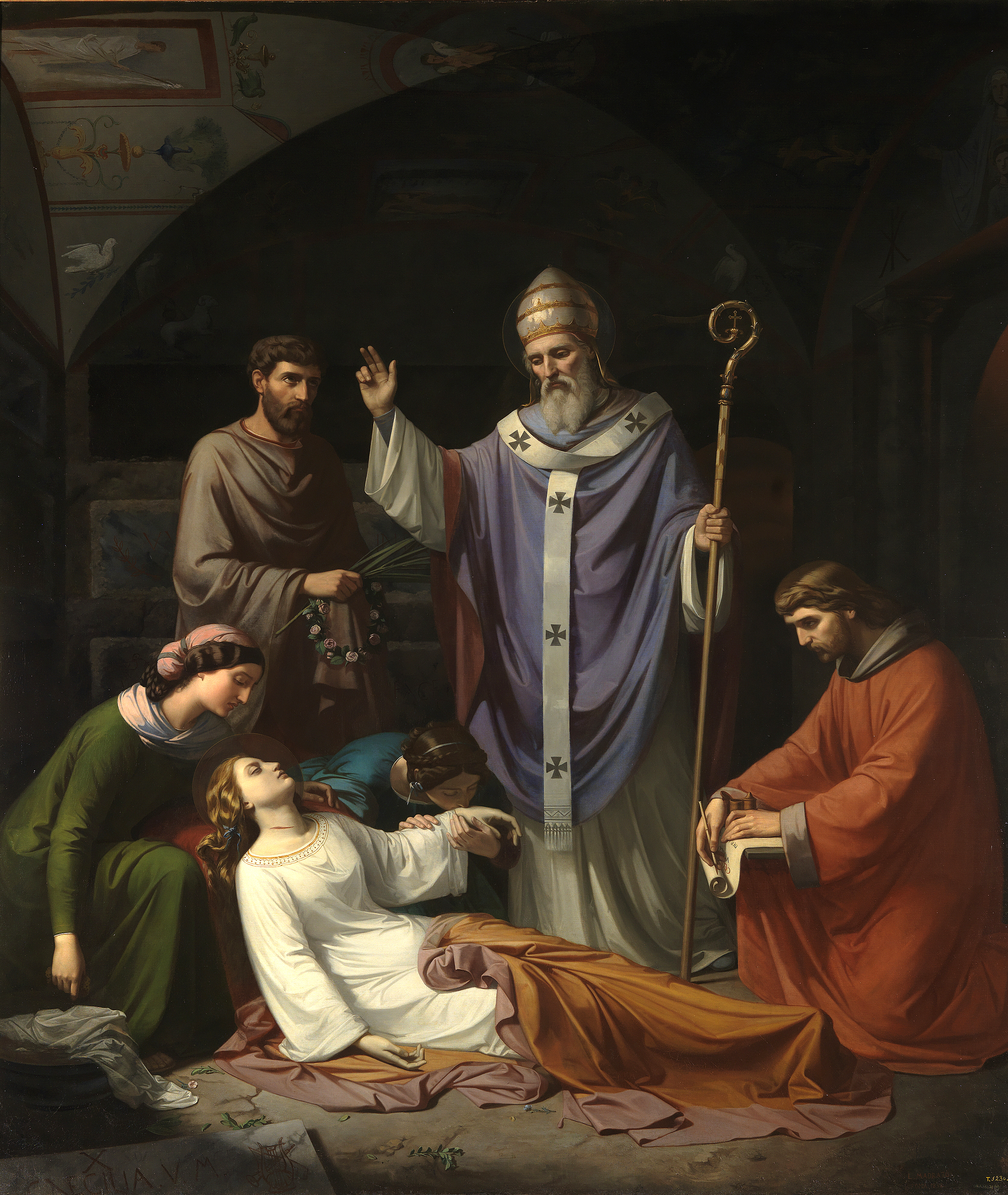 La obra representa el entierro de la mártir cristiana Santa Cecilia en las catacumbas de la ciudad de Roma.